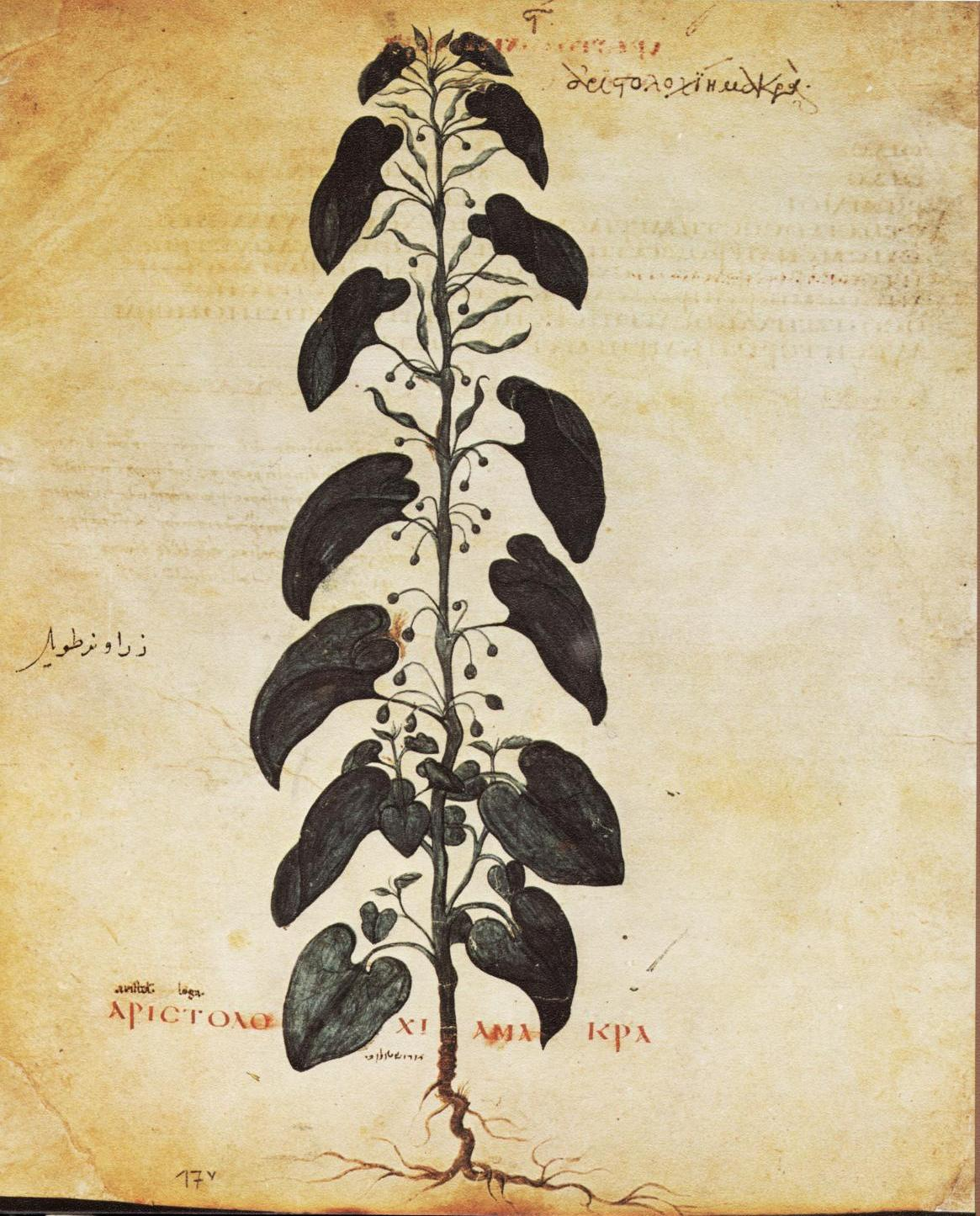 Pflanzenbild der Osterluzei aus dem Wiener Dioskurides, Blatt 17 verso (Aristolochia parviflora Sibth., Fam. Aristolochiaceae)